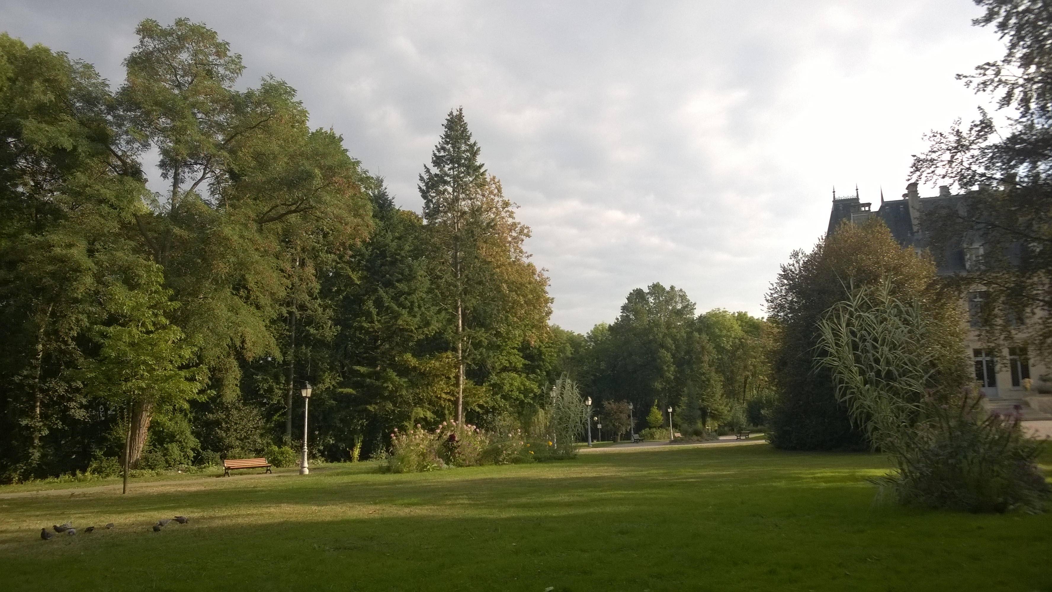 Parc du Domaine du Charmois à Vandoeuvre-lès-Nancy (France)